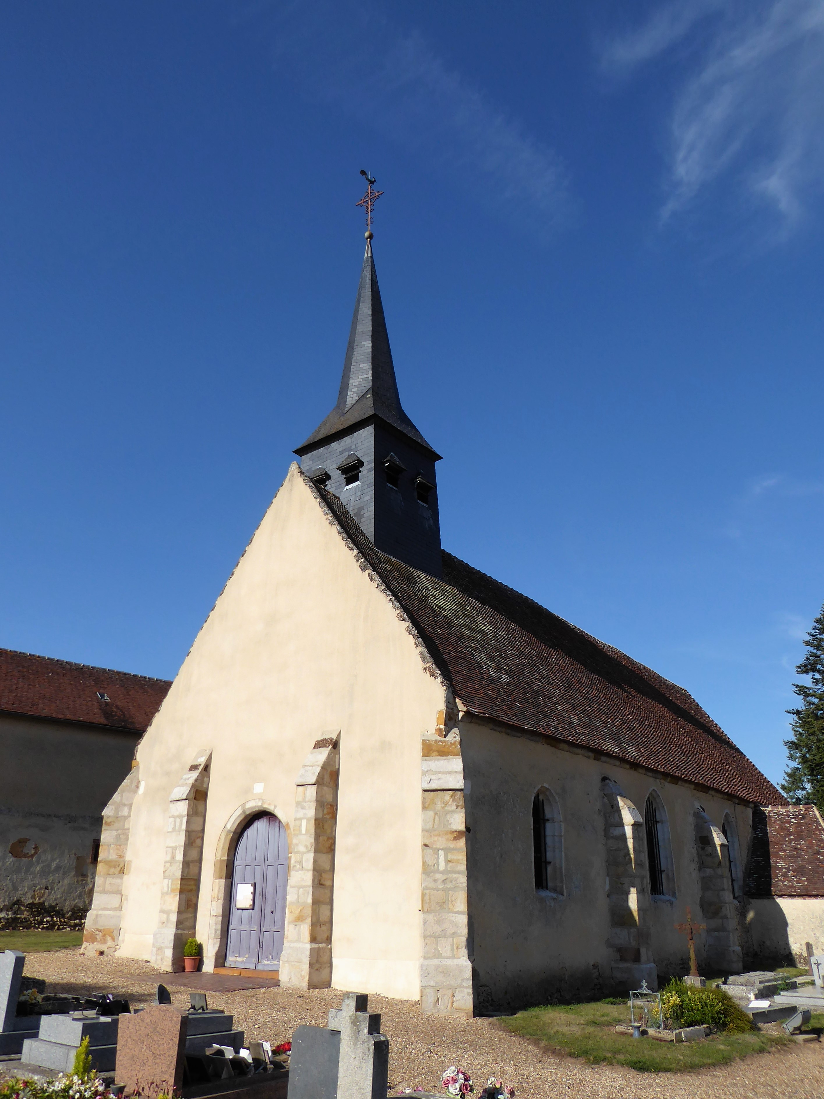 église Notre-Dame de La Mancelière, Eure-et-Loir, France.